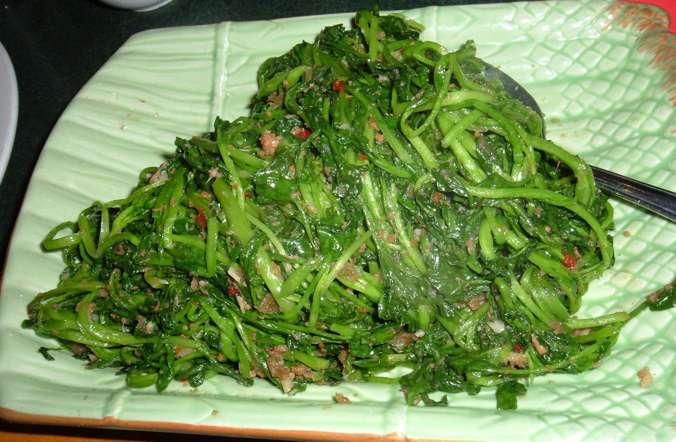 Kang Kung Belacan